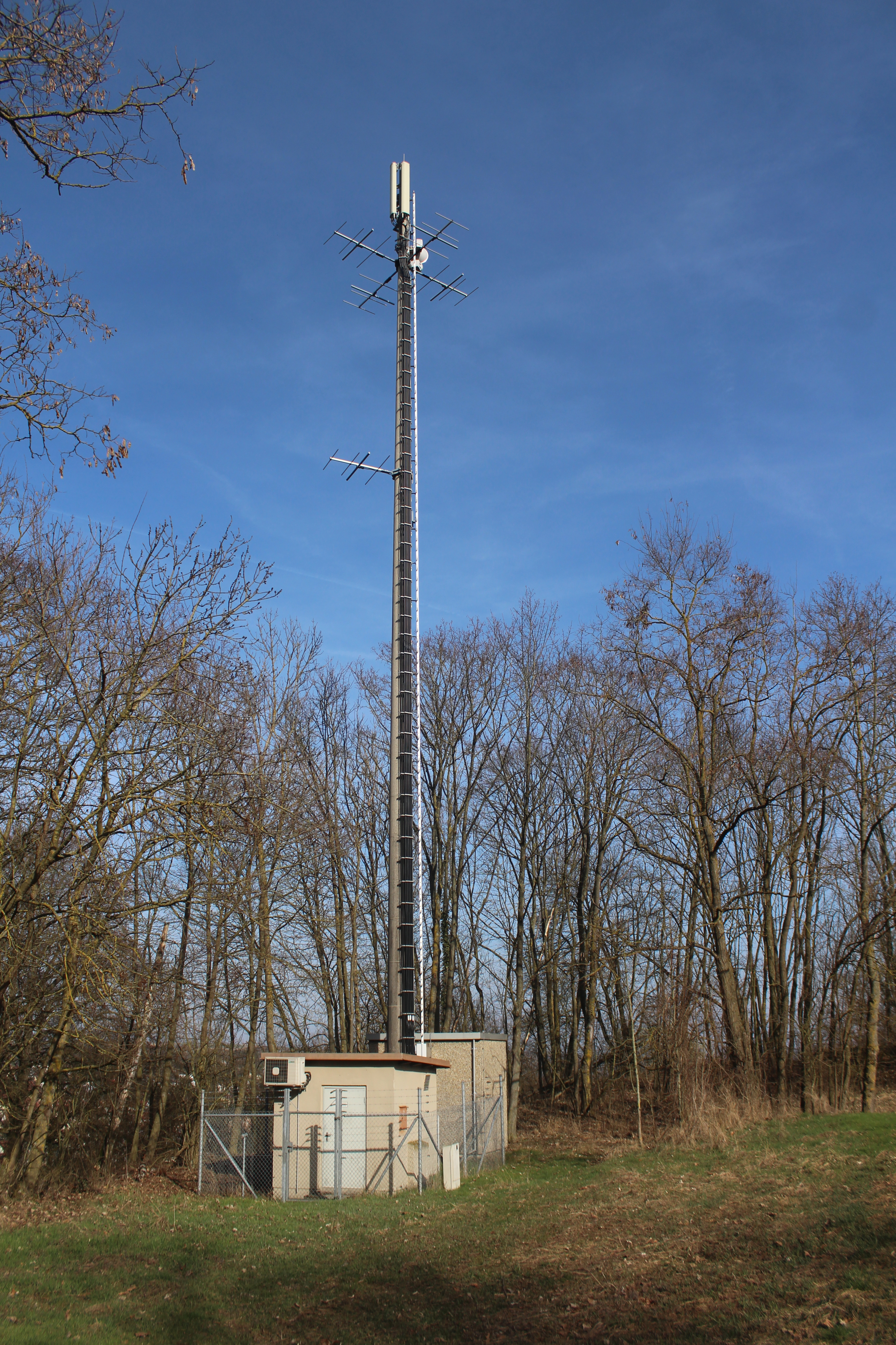 Sendeturm Ochsenfurt